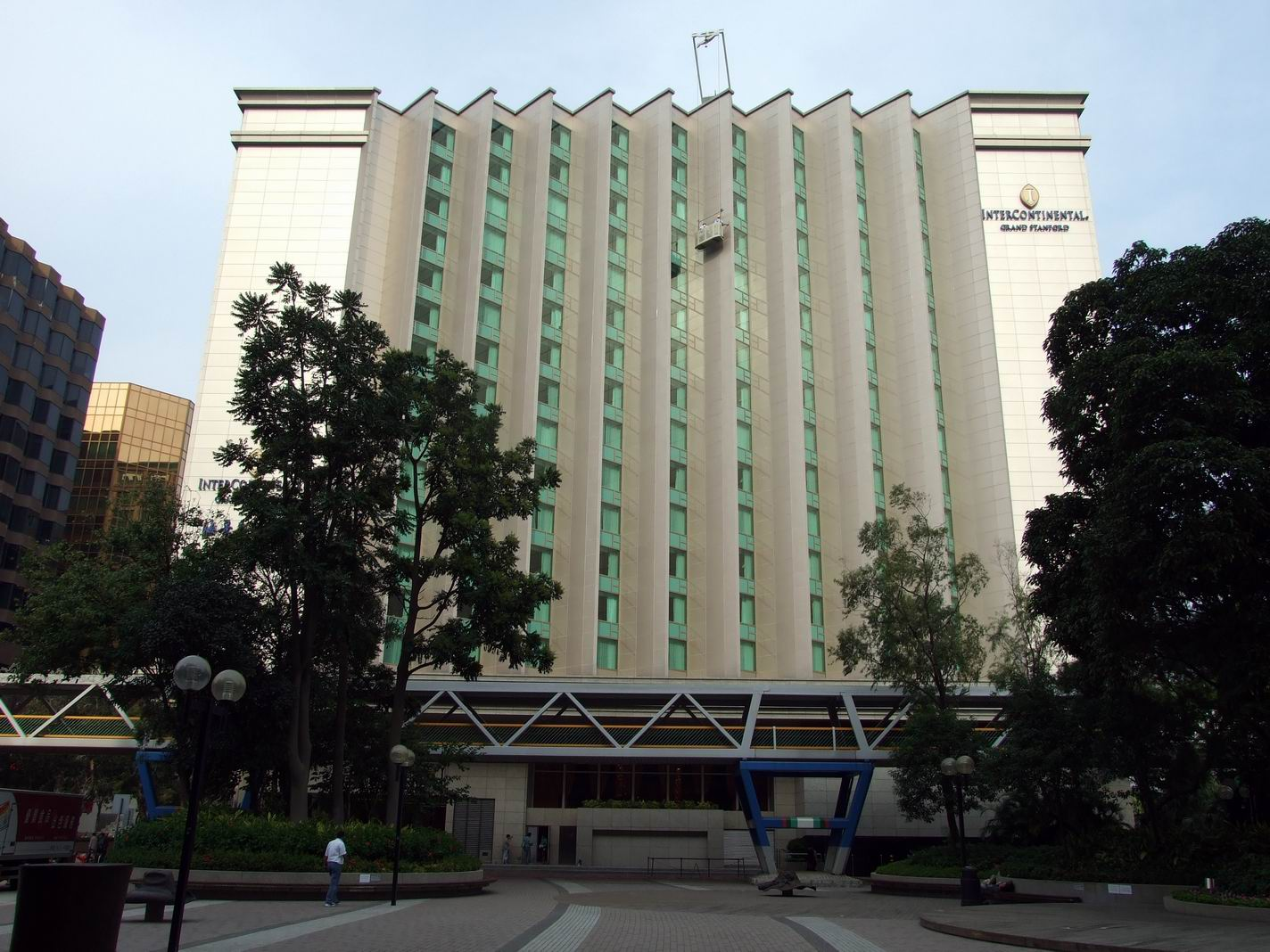 尖東zh:海景嘉福酒店